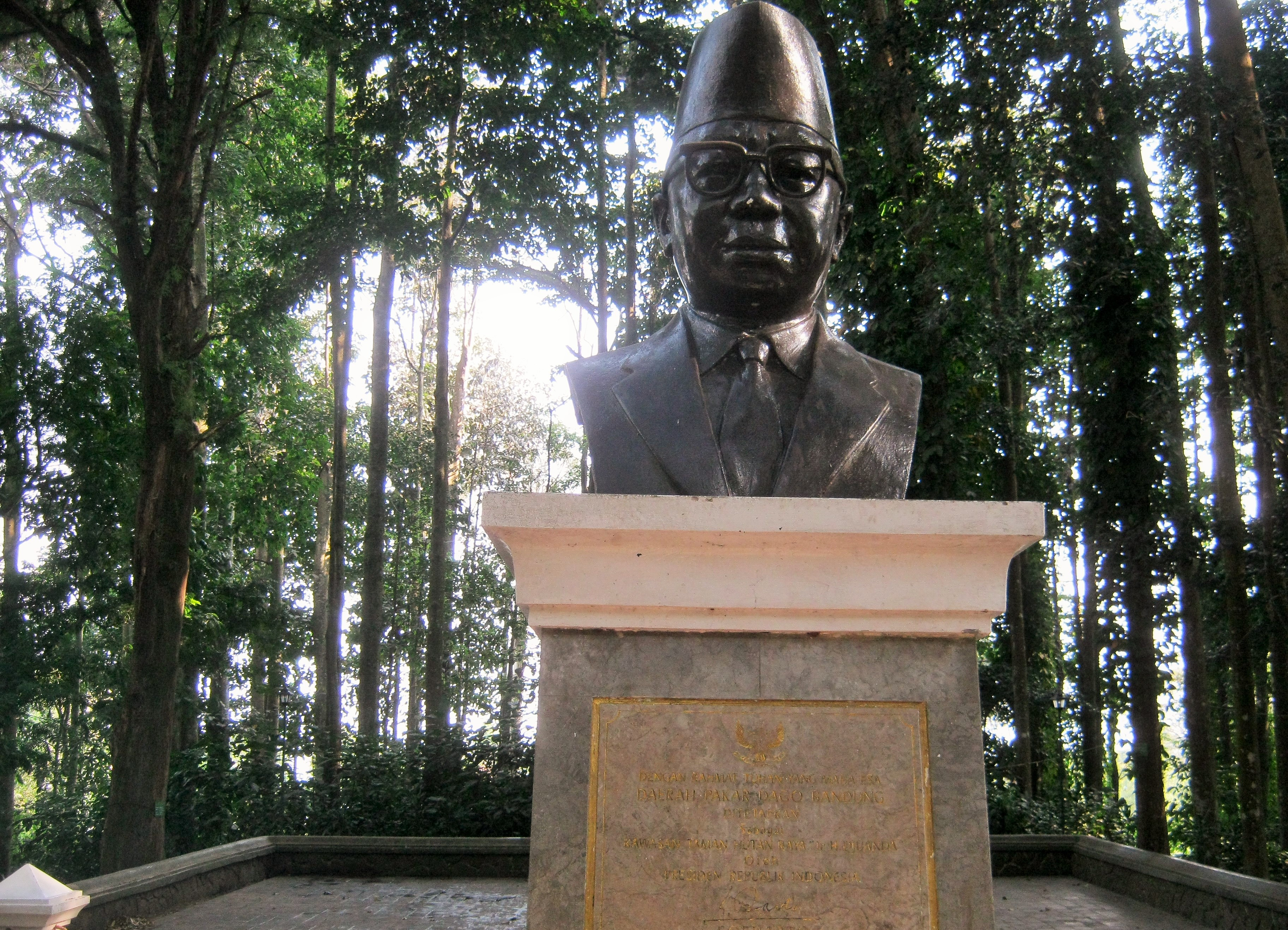 Monumen Patung Taman Hutan Raya Ir. Djuanda